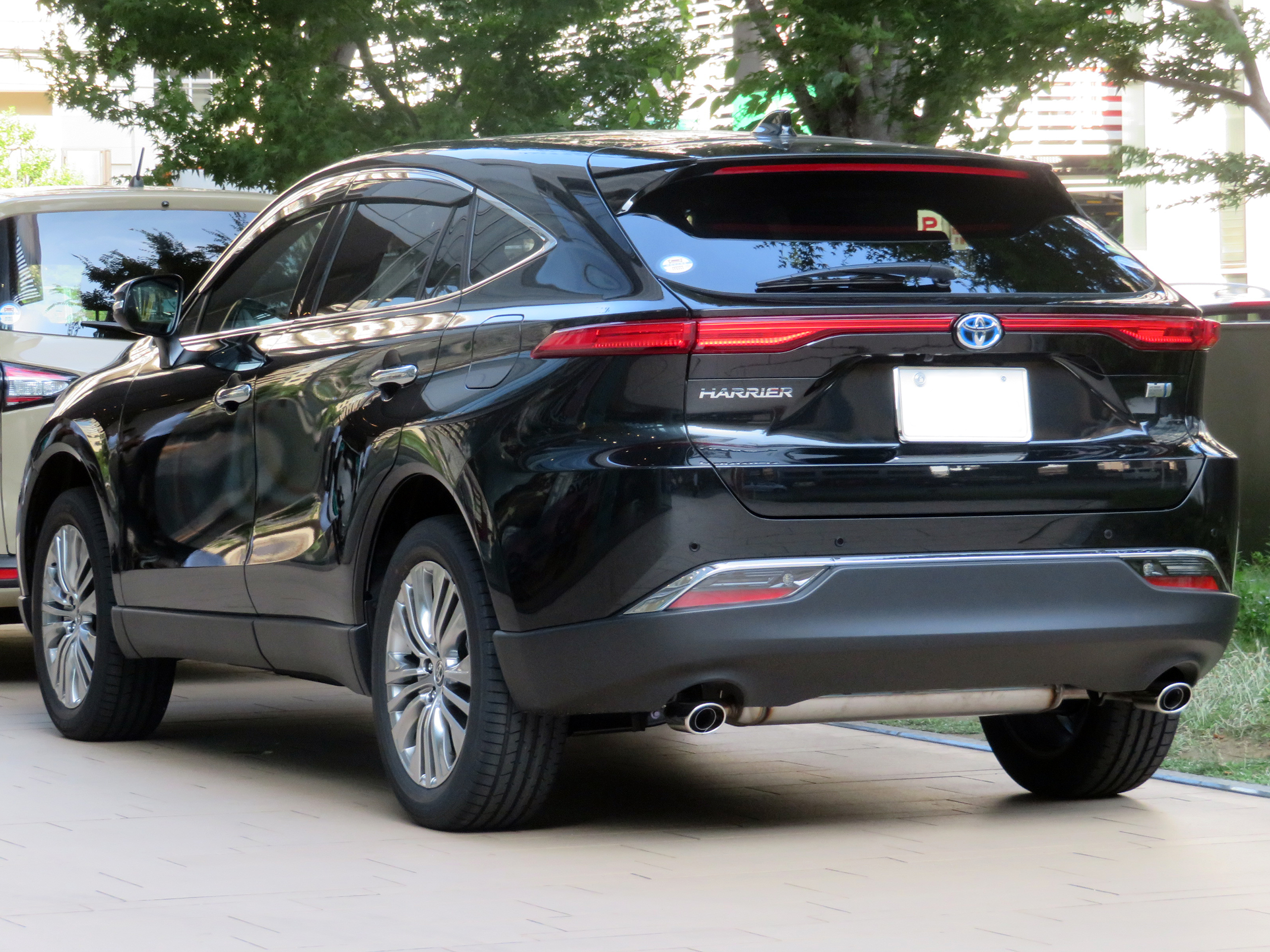 6AA-AXUH80-ANXSB型トヨタ・ハリアーHYBRID Z 2WDをリアから撮影。